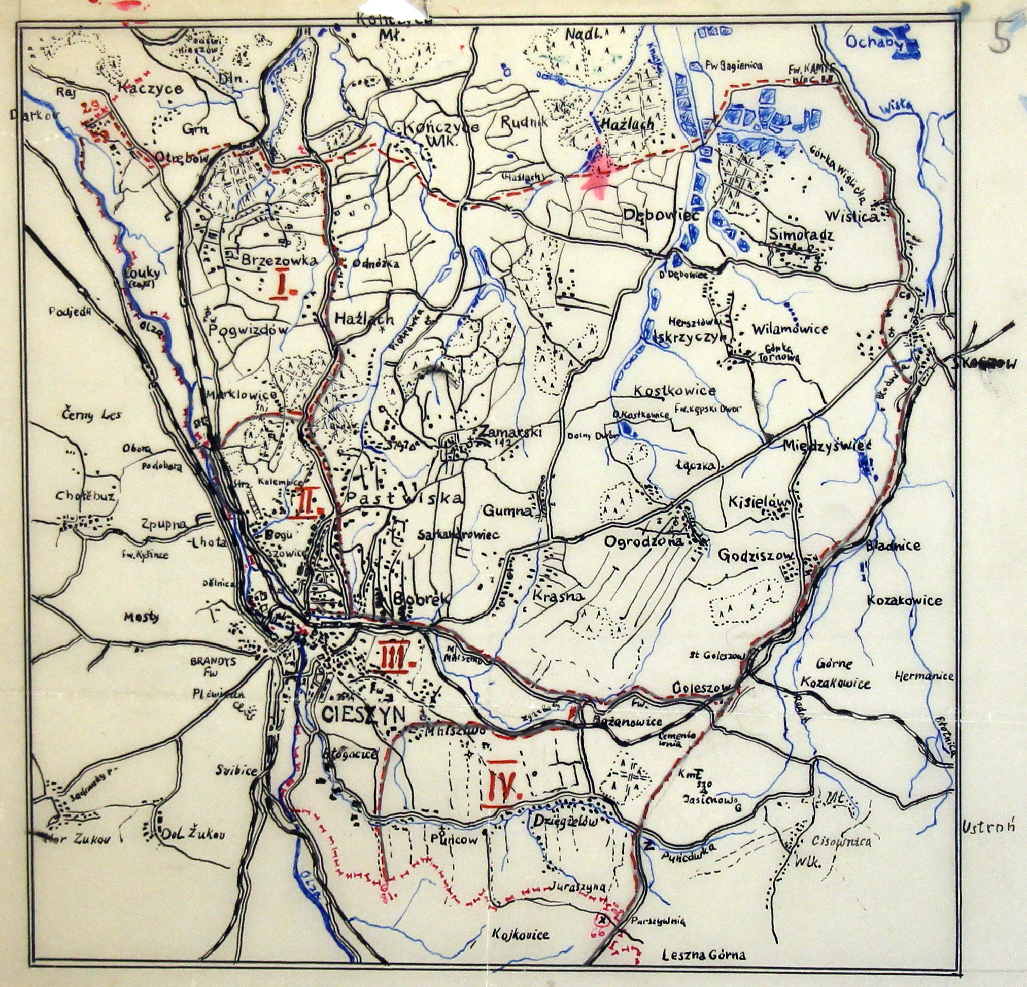 Szkic komisariatu SG Cieszyn - lata 30. XX wieku